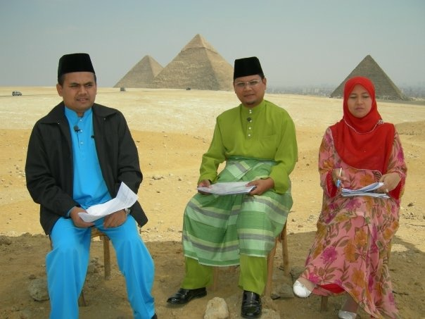 Rakaman Halaqah di Giza, Mesir